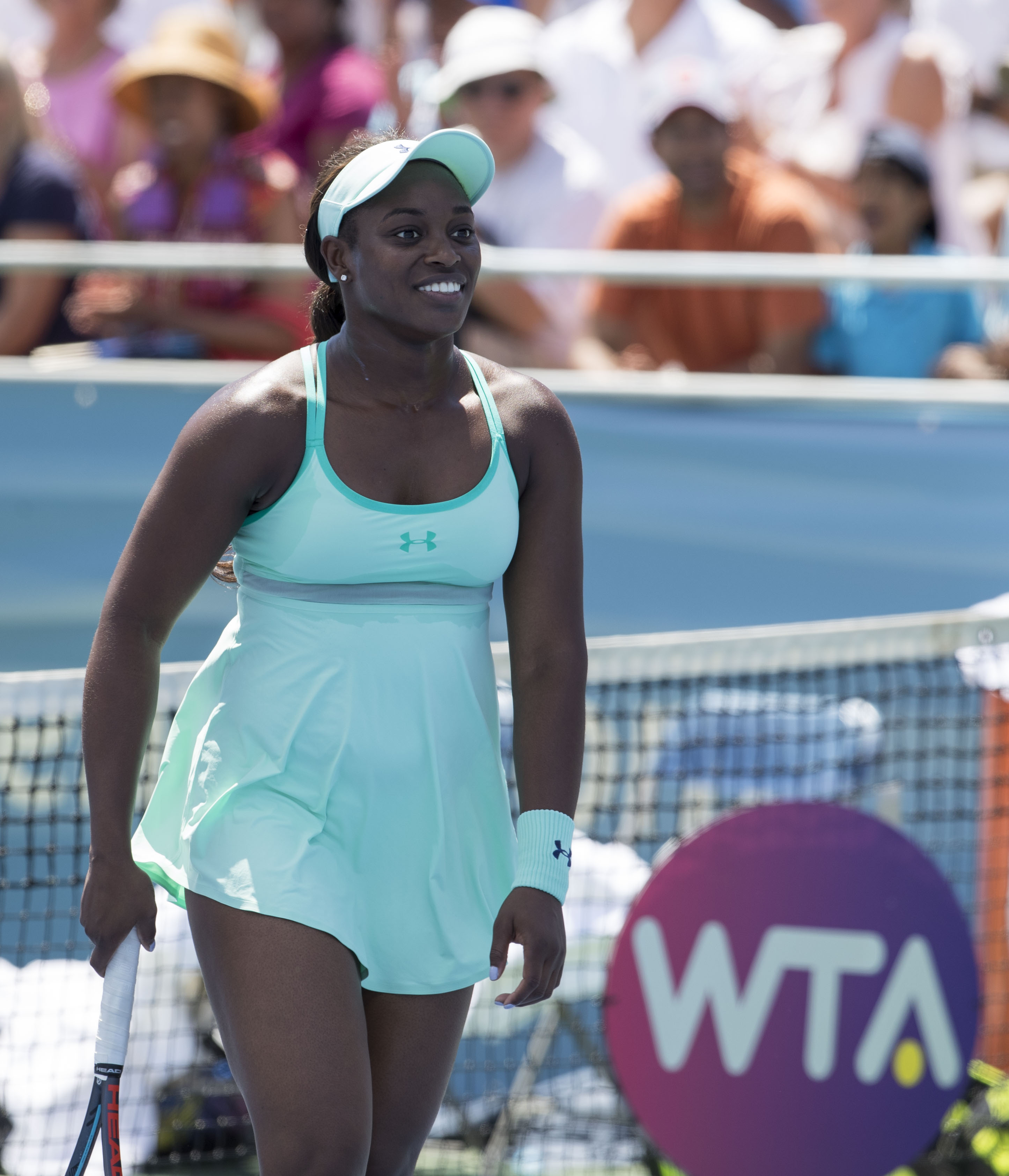 Citi Open Tennis 2017